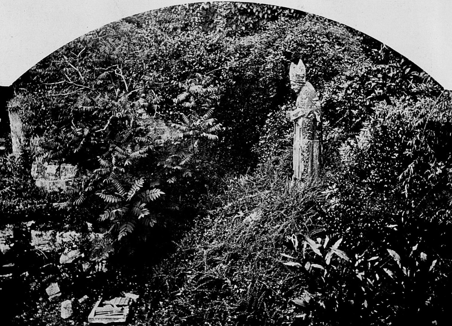 Abbaye de Landévennec : Statue de saint Guénolé dans les ruines de l'ancienne abbaye (photo prise probablement en 1903). Dans l'article de Paul Gruyer, cette statue est présentée comme étant celle de saint Corentin)